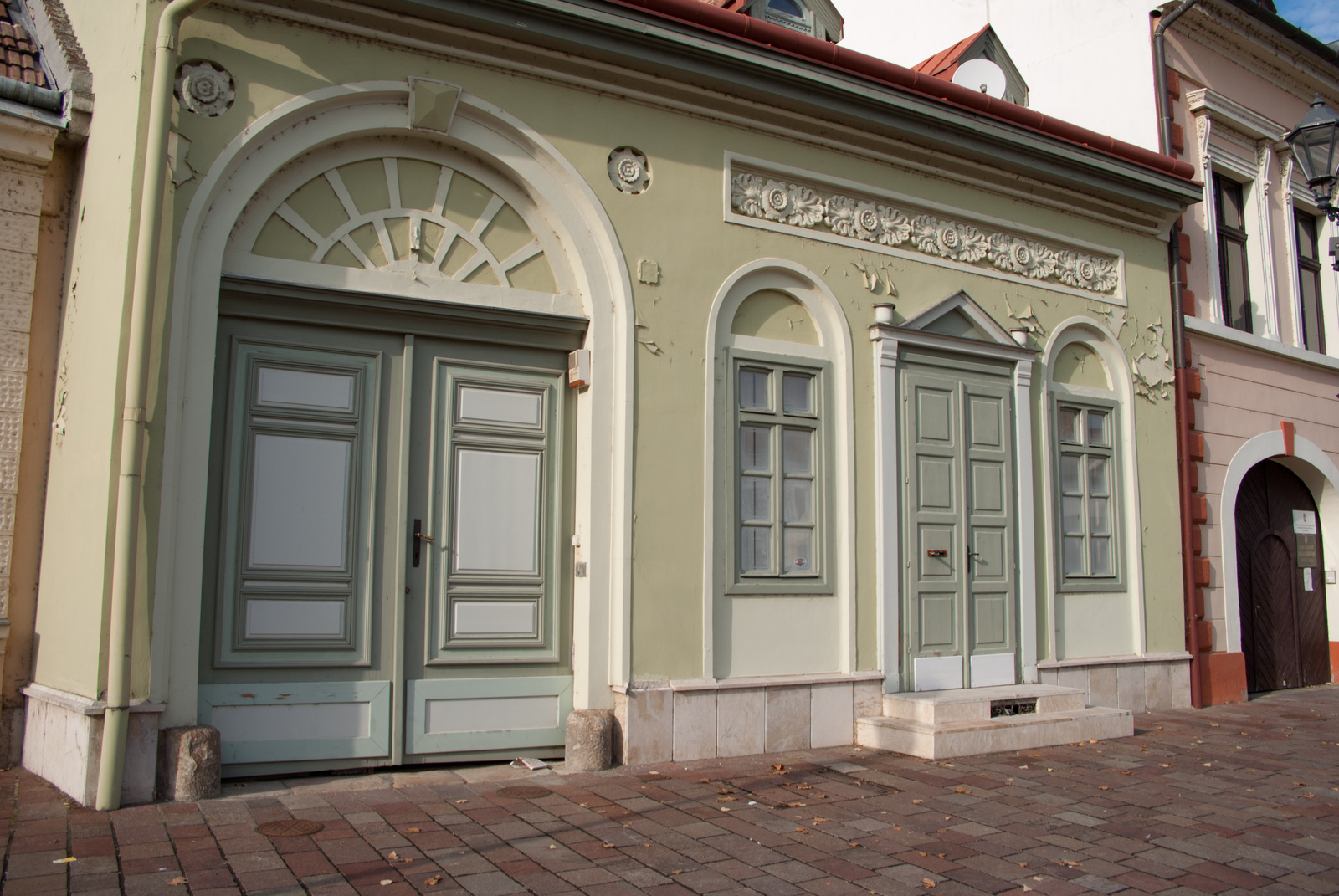 Lakóház (Esztergom, Széchenyi tér 6.) This is a photo of a monument in Hungary, Identifier: 6250